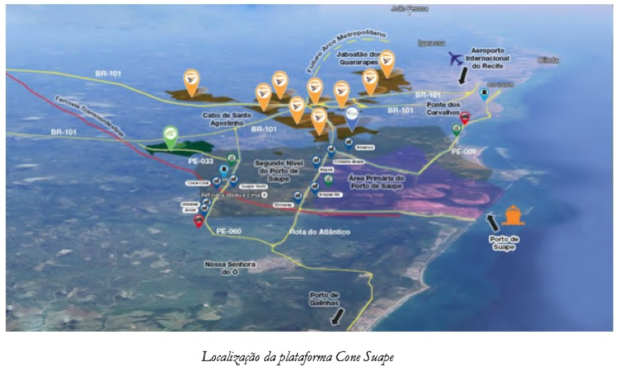 Abrangência e localização do Cone Suape, maior cluster de logística do país.